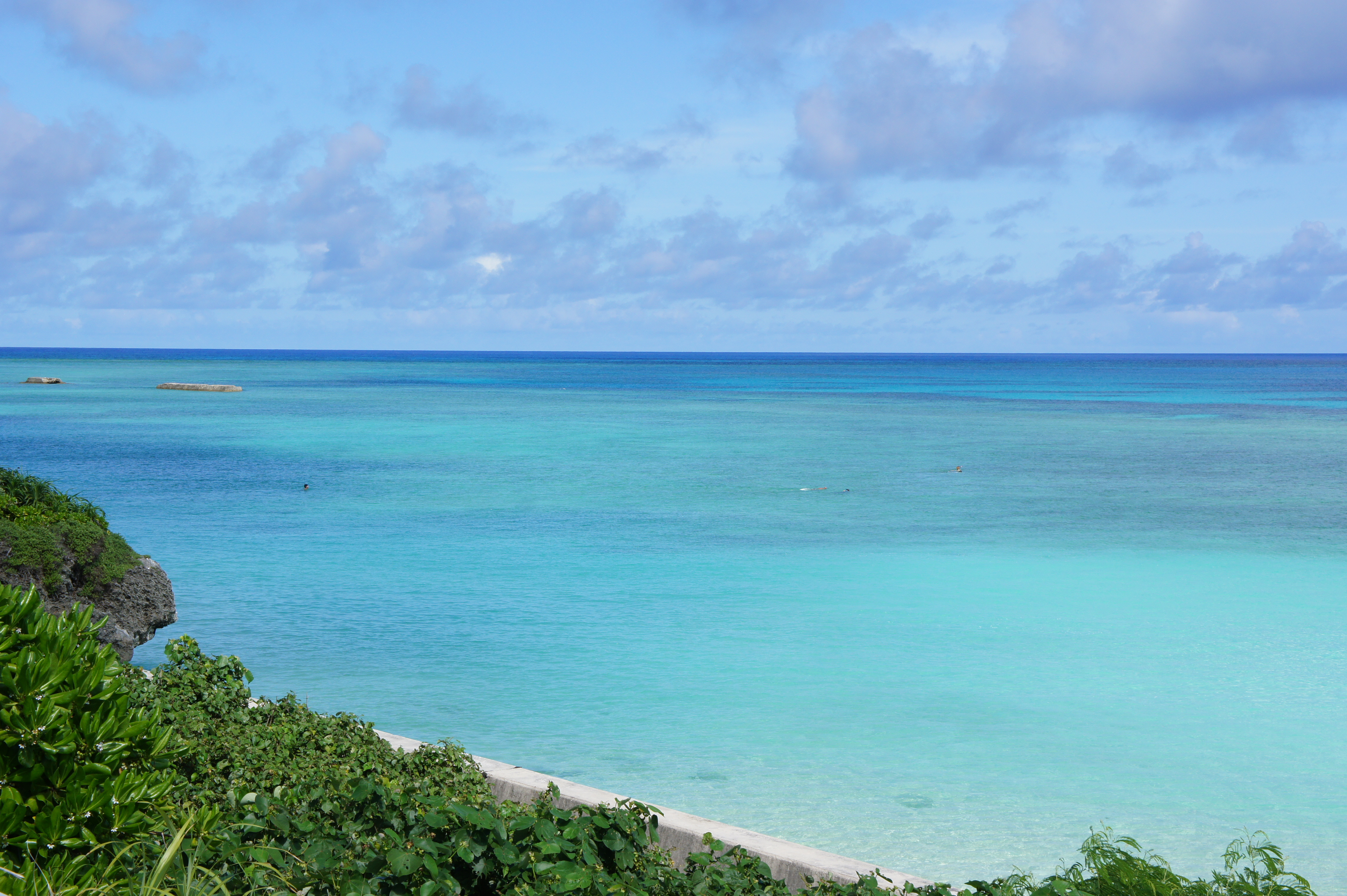 ニシハマビーチ、波照間島（沖縄県）。日本最南端の碑があり、冬には南十字星も見える。